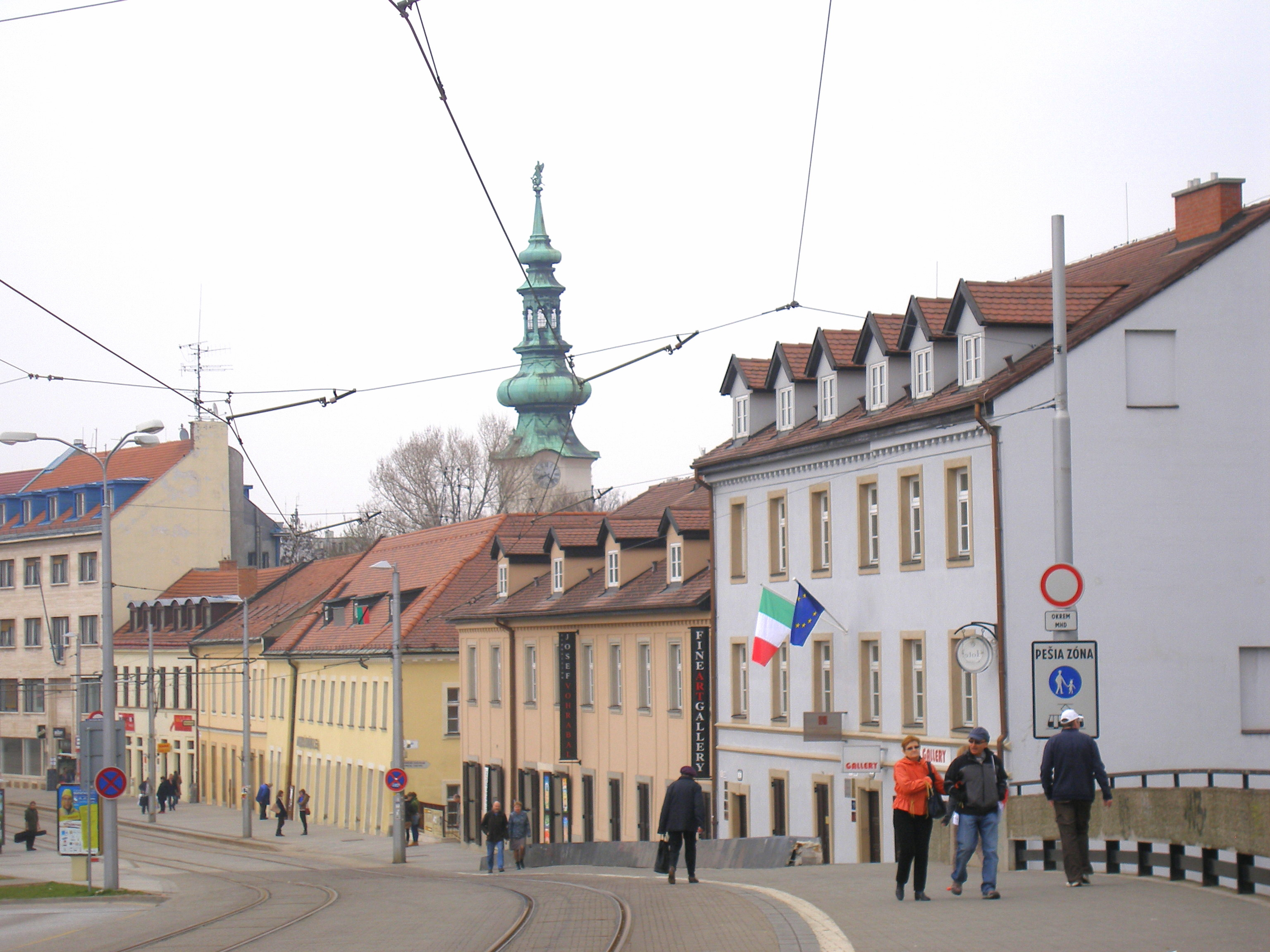 Bratislava časť Staré mesto